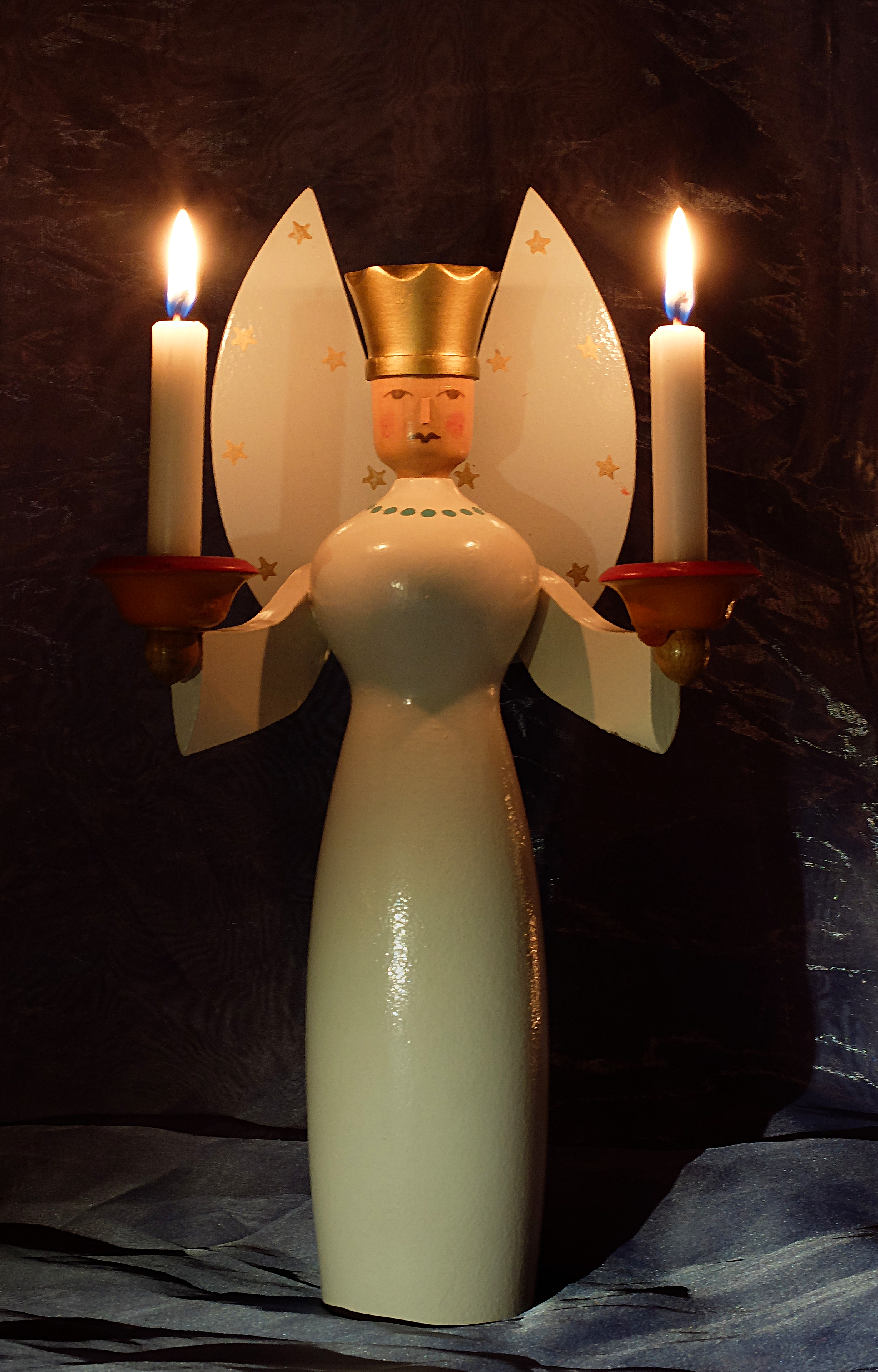 Lichterträger - Engel; gedrechselt; produziert ca. 1985, Erzgebirge